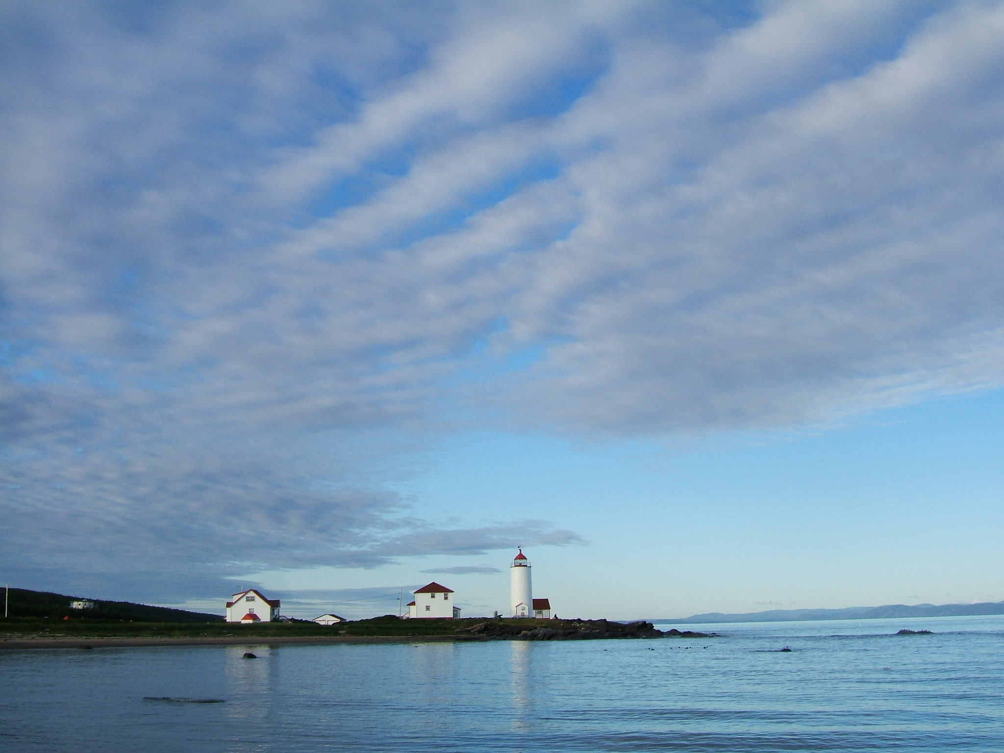 Phare de l'île Verte à Notre-Dame-des-Sept-Douleurs